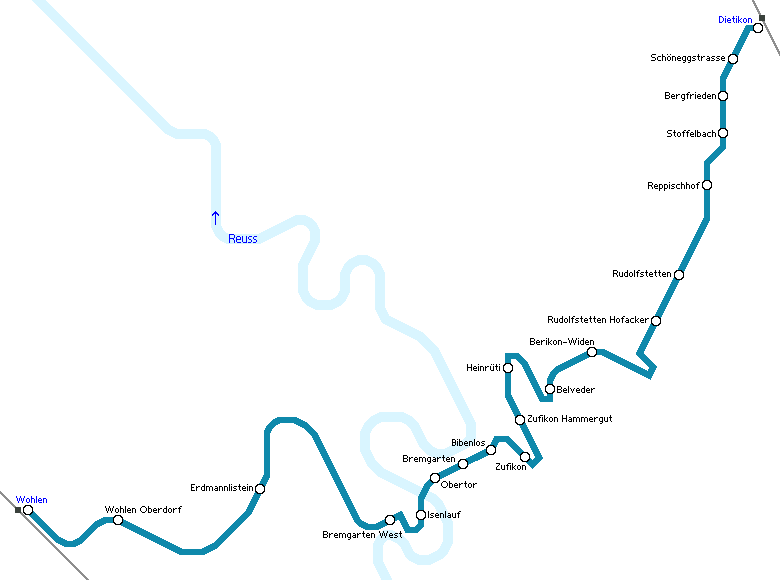 Streckenkarte der Bremgarten-Dietikon-Bahn